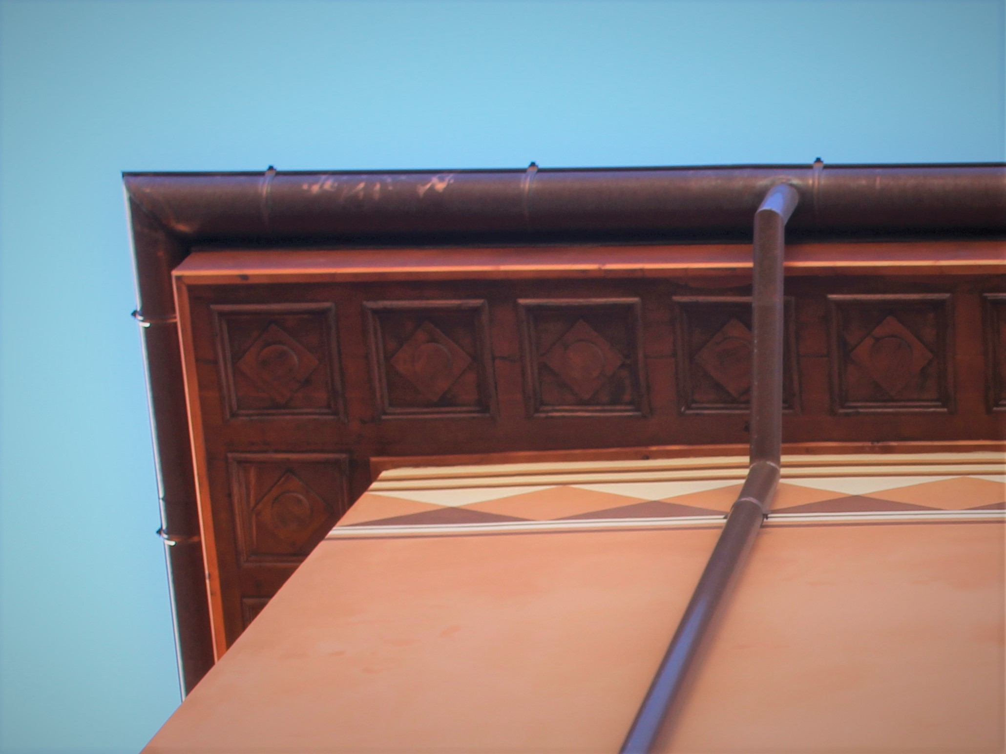 Particolare dell'attacco a cielo di Palazzo Branconio in L'Aquila.